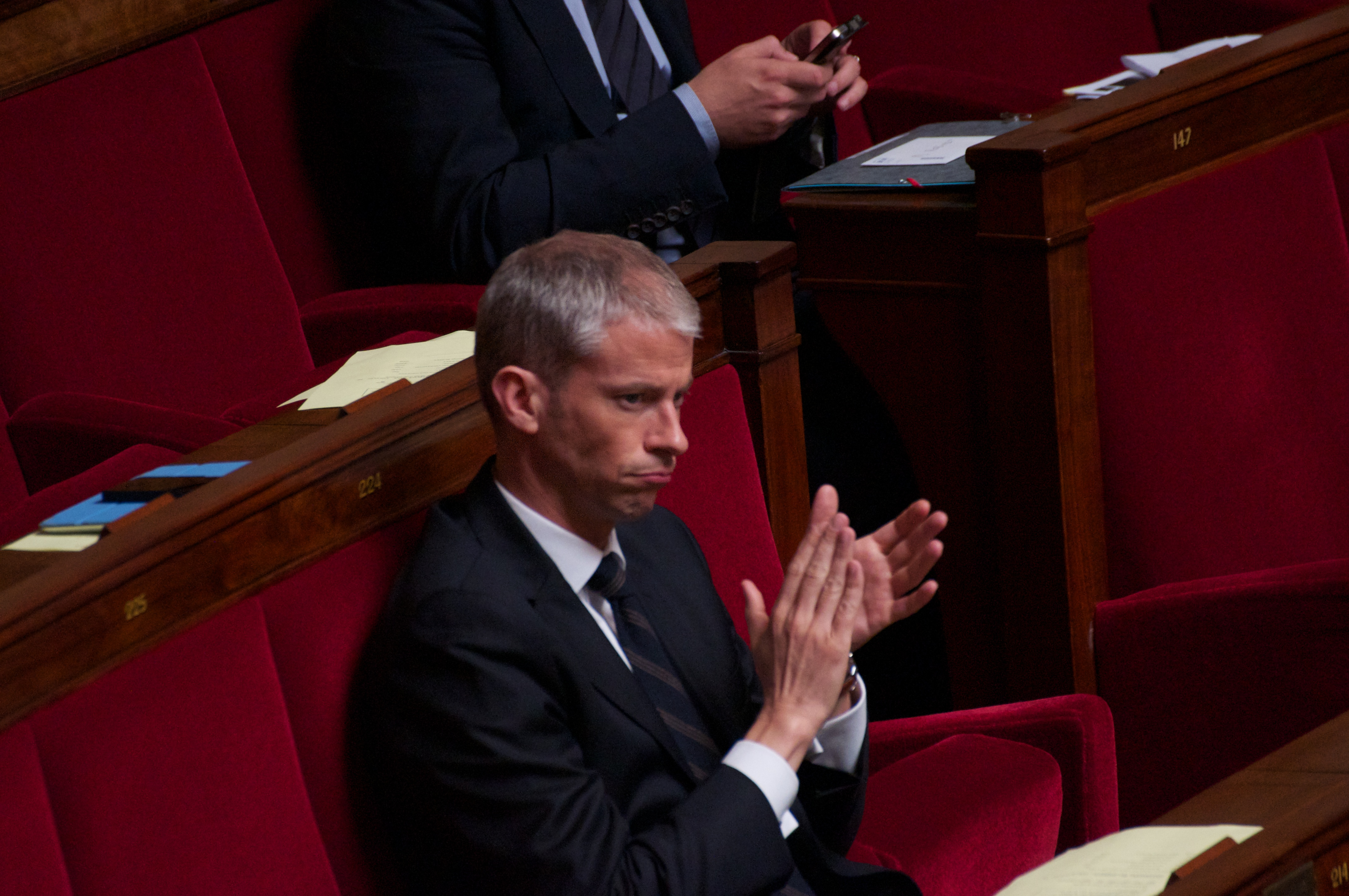 Franck Riester au vote solennel de la loi ouvrant le mariage aux couples de personnes de même sexe - Assemblée nationale